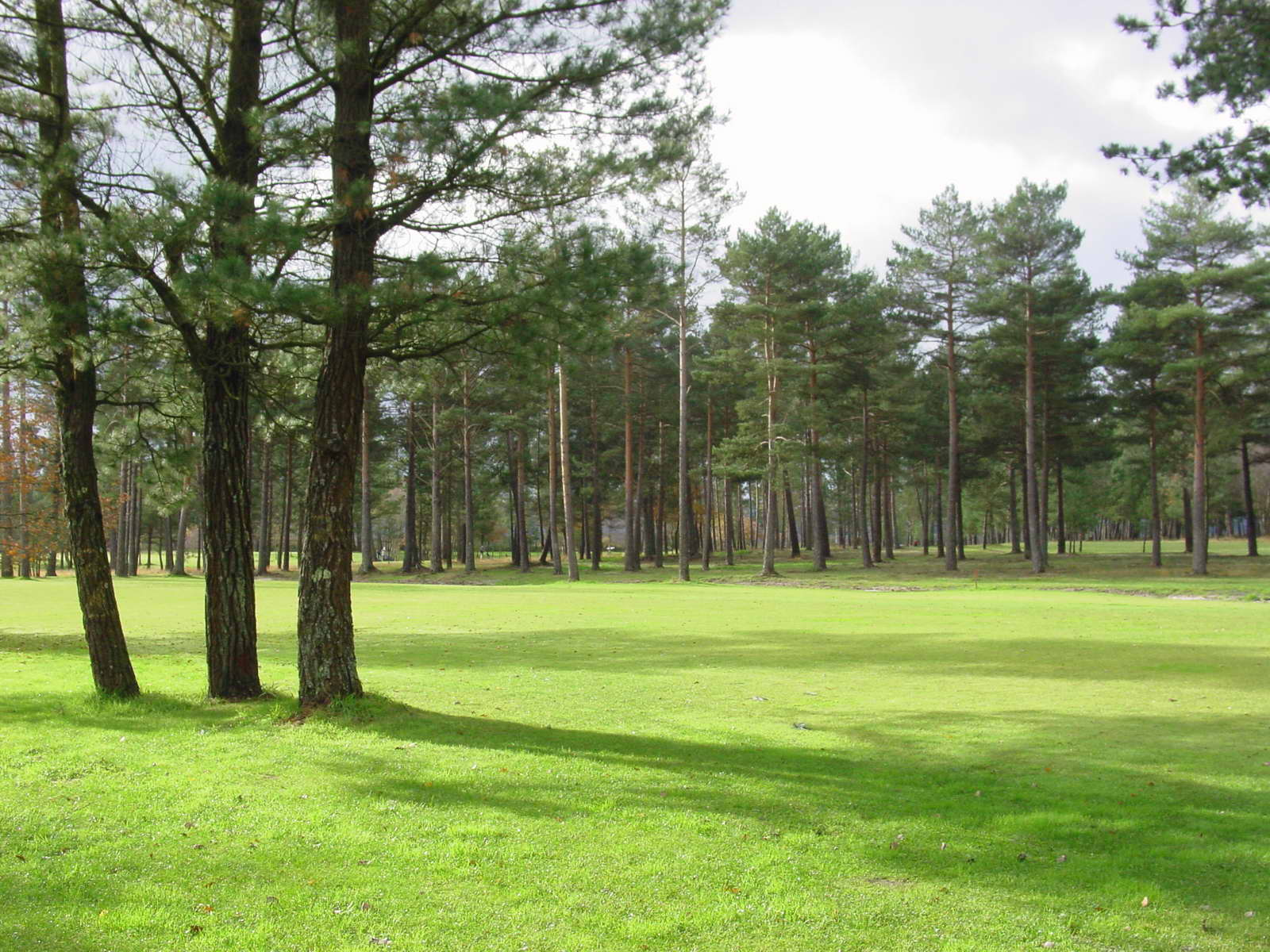 Balneario 031207 020.jpg